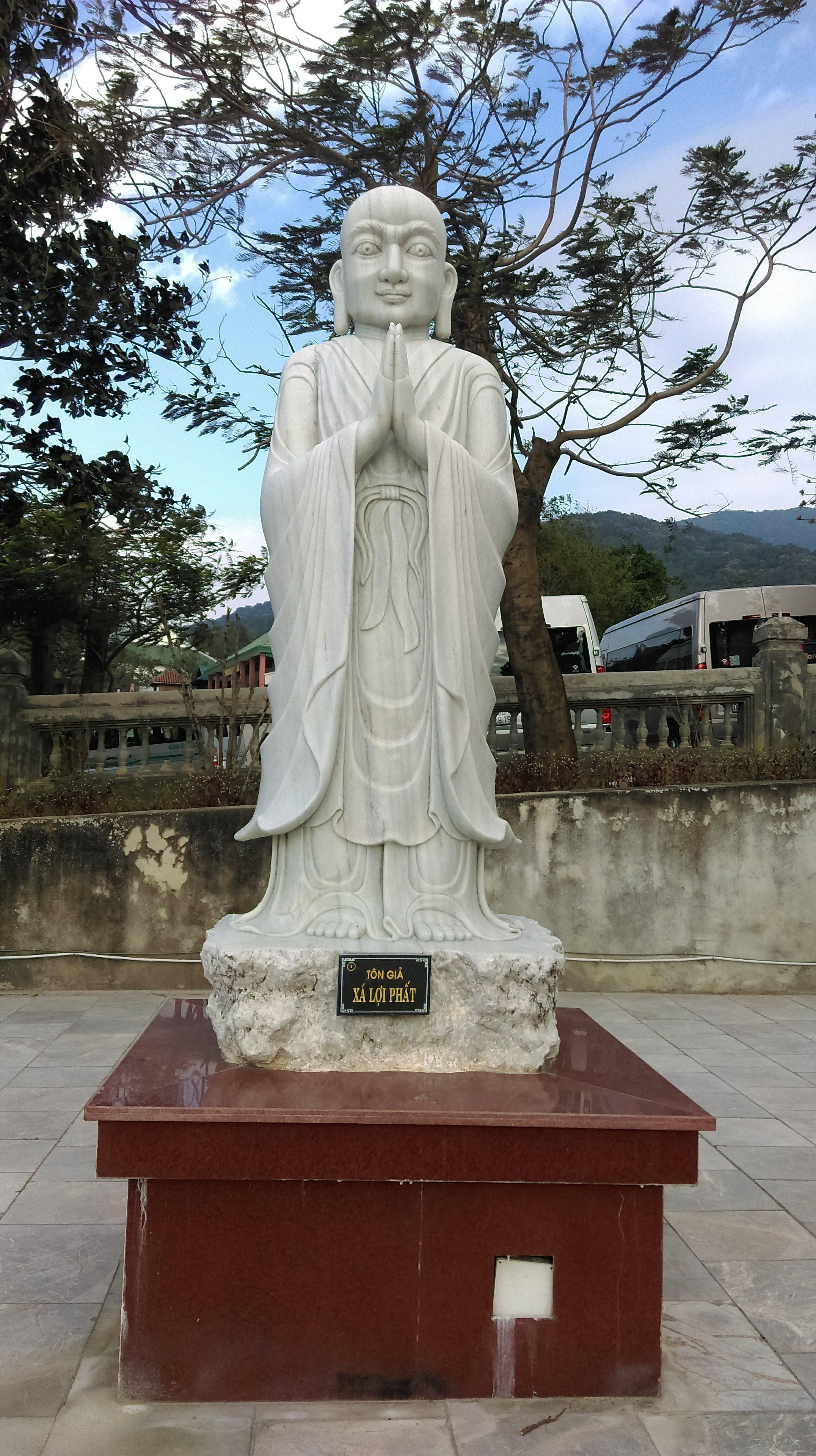 Xá Lợi Phất, chùa Linh Ứng Sơn Trà, Đà Nẵng